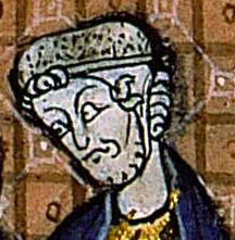 Robert of Normandy